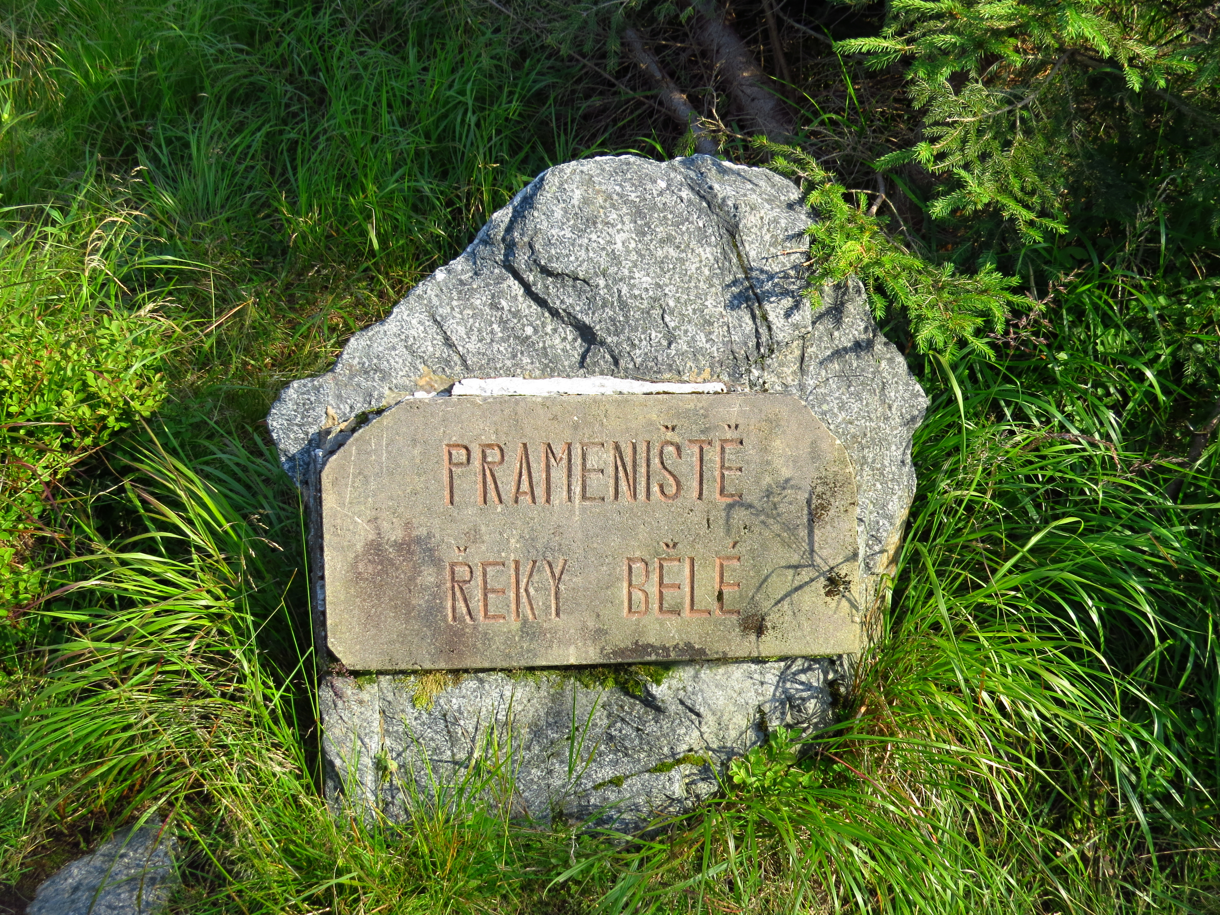 Project: Chráněná území